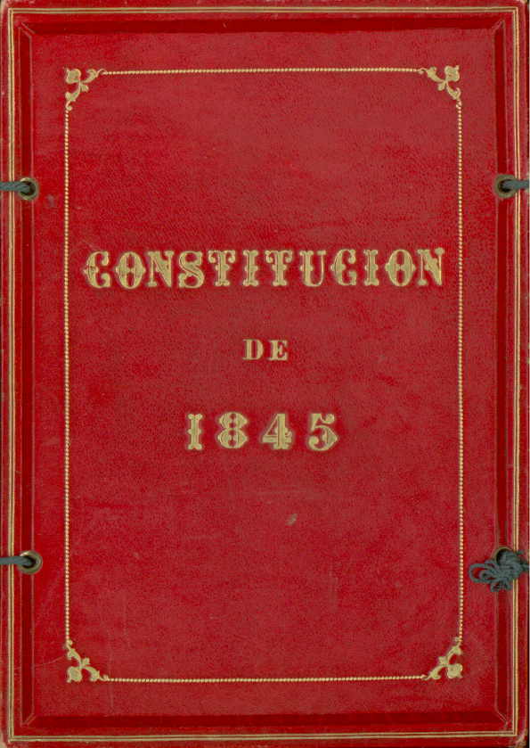 Constitución de 1845